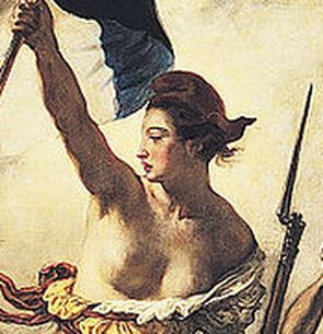 Zoom al barret dels estudiants de l'escola politècnica, que no s'ha de confondre amb els dels militars, ja que estàven contra els monàrquics a la revolució de Julioll.